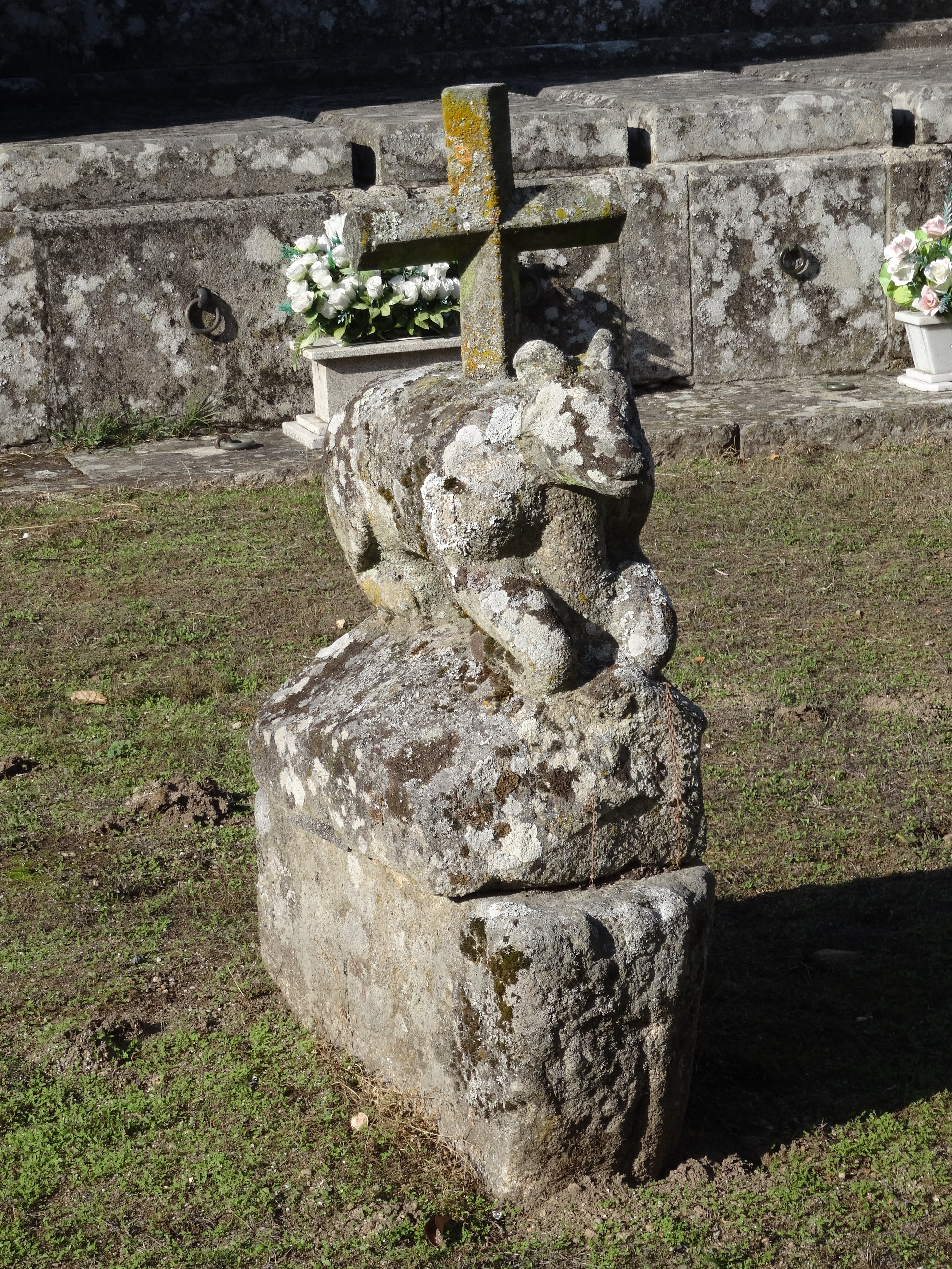 Ver título.